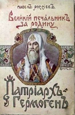 Обложка книги Павла Россиева "Великий Печальник за родину патриарх Гермоген"